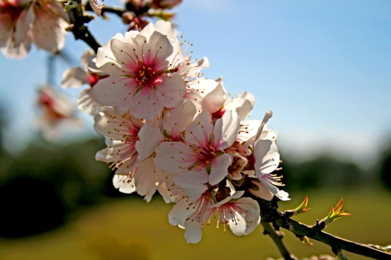 On Explore #285 - 11.2.2008